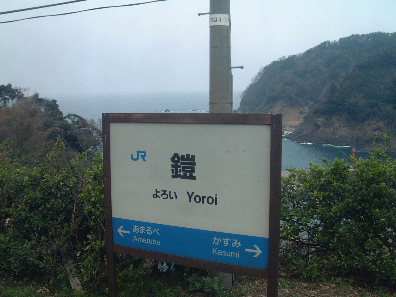 鎧駅駅名看板